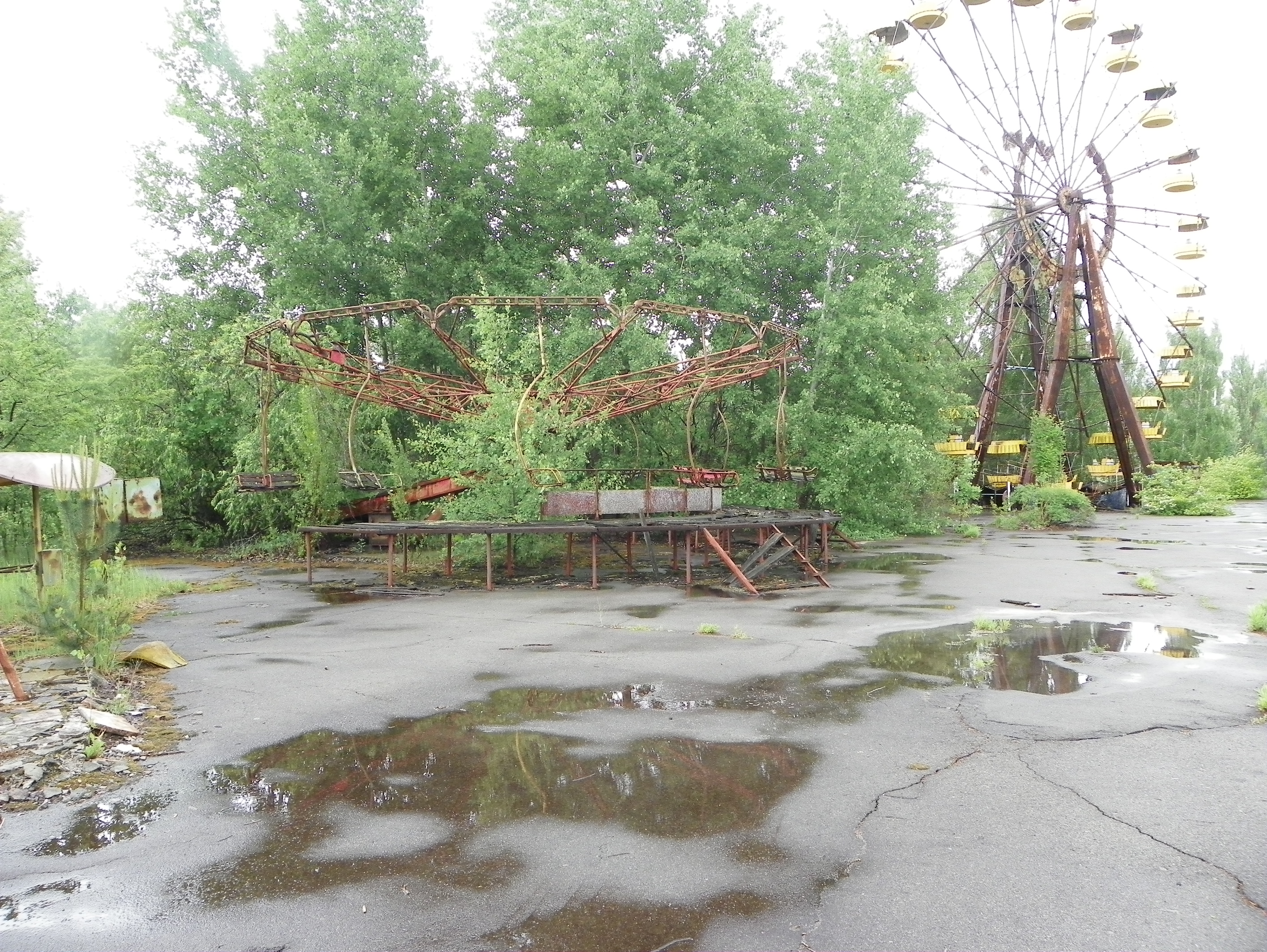 Місто Прип'ять Чорнобильської зони